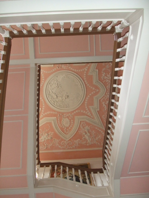 Kloster Untermarchtal, Untermarchtal, Alb-Donau-Kreis, Baden-Württemberg Mutterhaus St. Agnes (ehem. Schloss), Treppenhaus